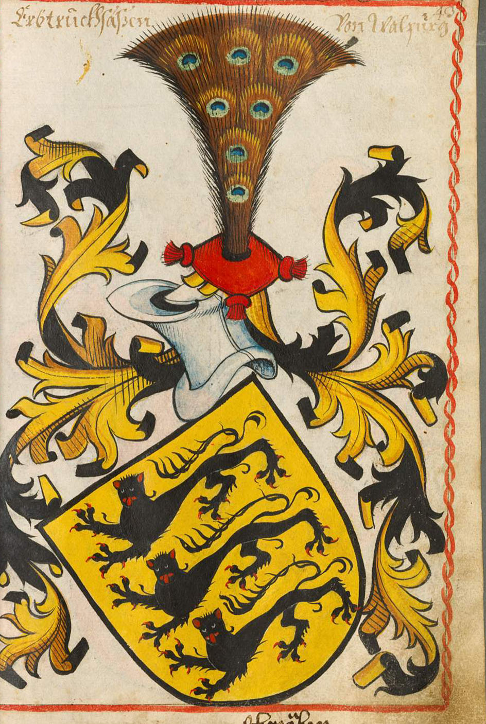 Scheibler'sches Wappenbuch, älterer Teil Waldburg